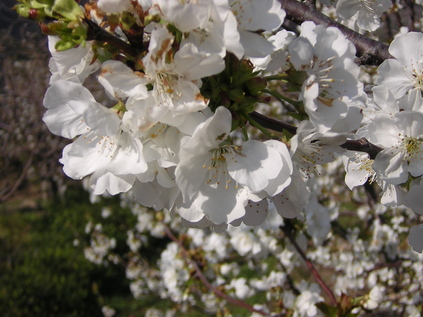 Cerezo en flor. El Torno